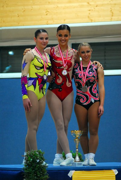 Lubi Gazov (middle). Austrian Aerobic Open_Sieger_IW18+